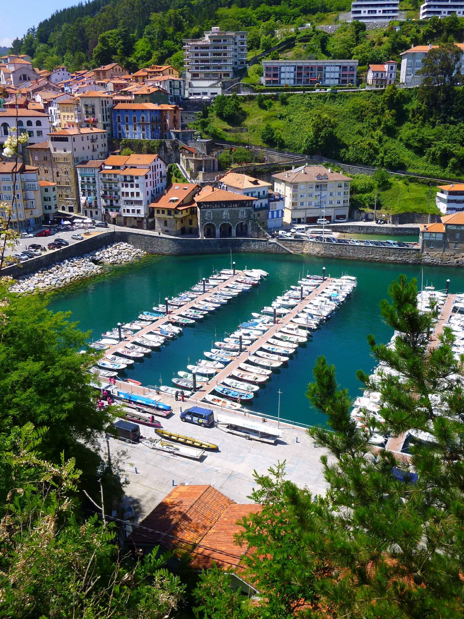 Puerto pesquero de Mutriku (Gipuzkoa)